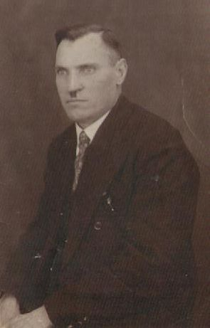 Franciszek Fesser, powstaniec śląski, poseł do Sejmu Śląskiego